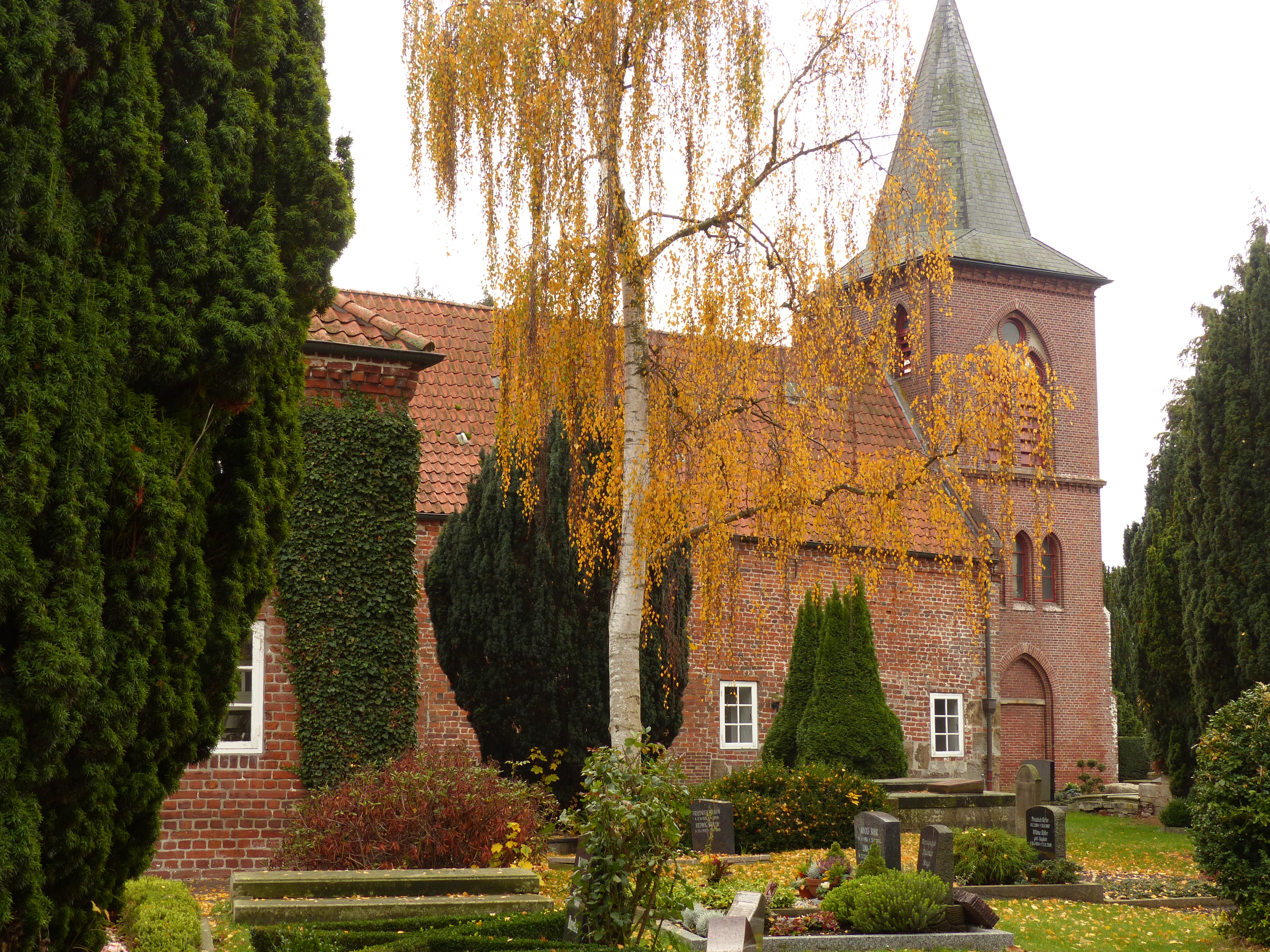 St.-Nicolai-Kirche in Elsfleth: Turm und Westflügel (altes Schiff) von Norden